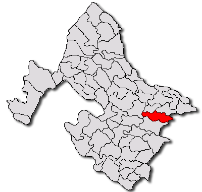 Categorie:Hărţi ale judeţului Mehedinţi